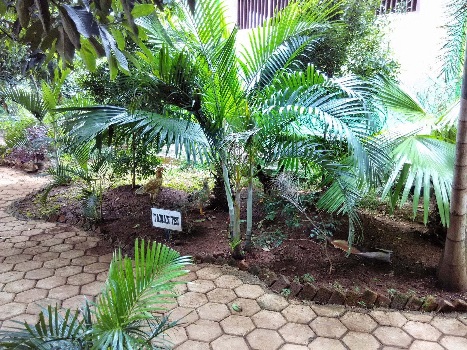 Taman SMK Negeri 2 Kota Bekasi